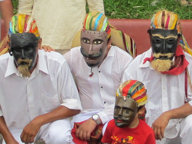 Integrantes de la danza del "Caballito blanco", Municipio de Nacajuca, estado de Tabasco, México.